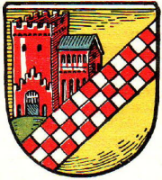 Summary Stadtwappen Hörde. Historisches Wappen, nicht in amtlicher Verwendung. Licensing 13:54, 23. Dez 2005 Watz 180 x 200 (84771 Byte) (Stadtwappen Hörde. Historisches Wappen, nicht in amtlicher Verwendung.)